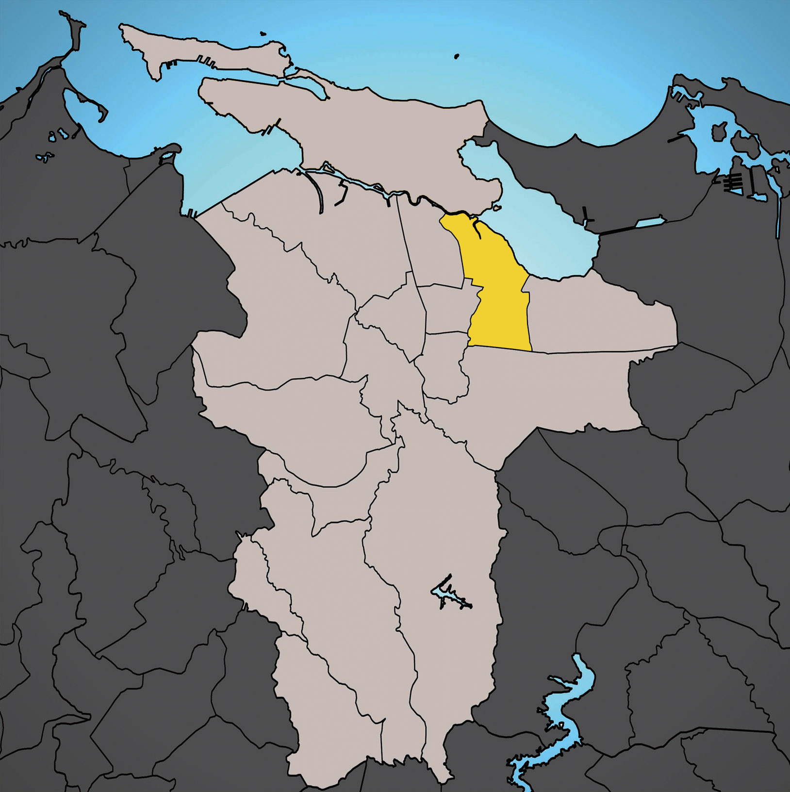 Oriente Barrio Locator map